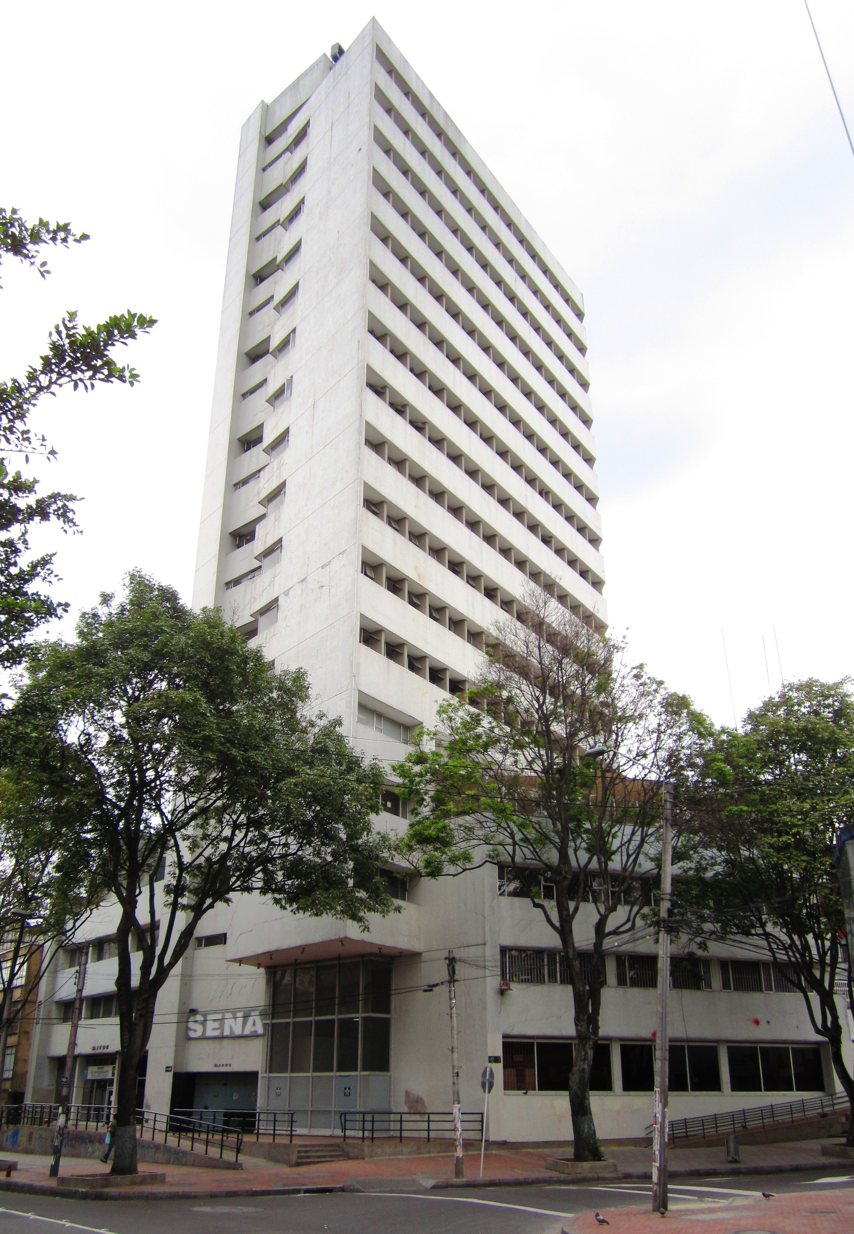 Bogotá, torre del Sena en Chapinero, calle 65 (# 11 - 70) entre carreras 11 y 13. Barrio Chapinero Norte, localidad de Chapinero.